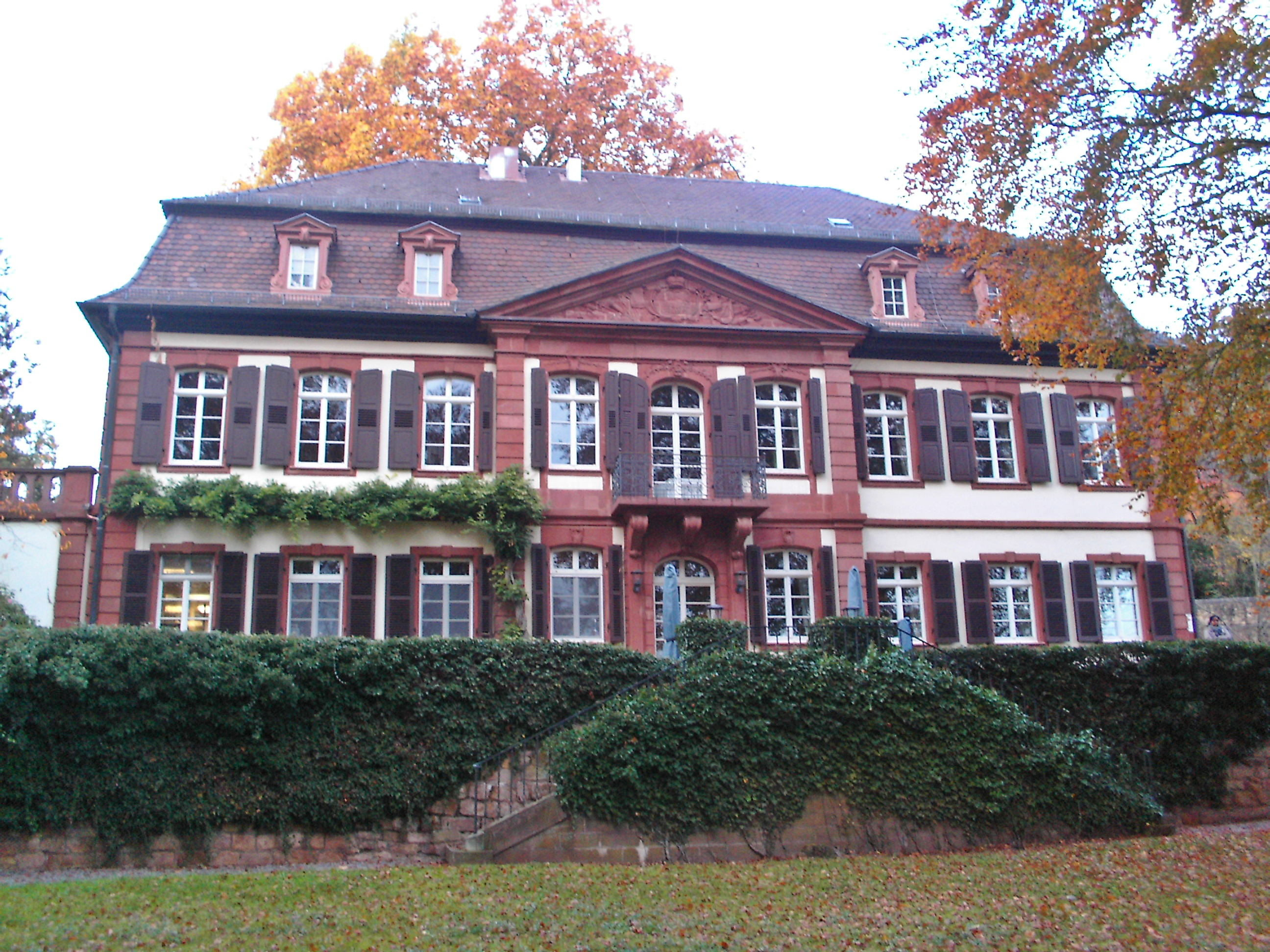 Schloss Löwenstein, Albersweiler, Ortsteil St. Johann, Rheinland-Pfalz